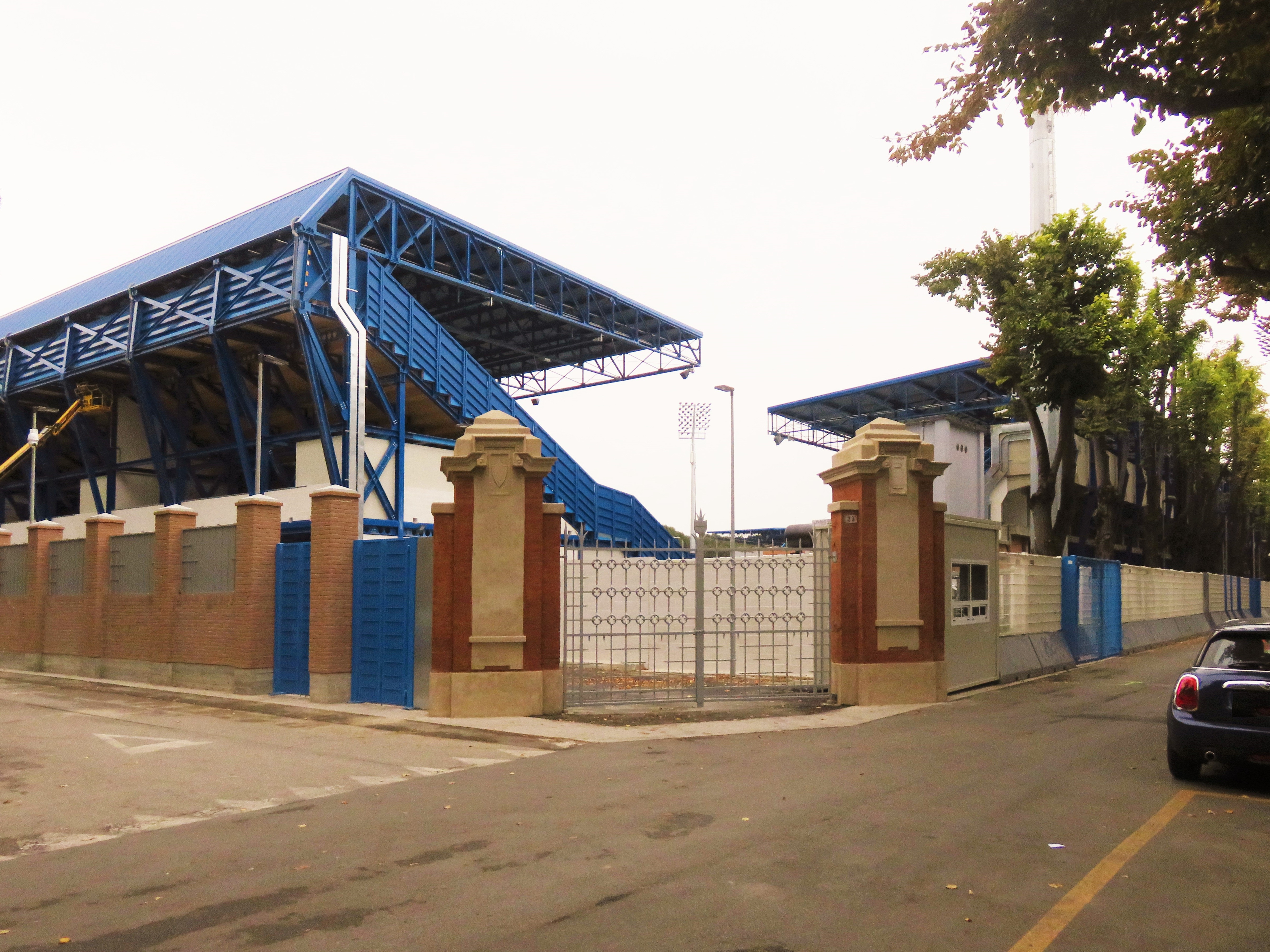 Ingresso nord est su via Cassoli. Dopo i lavori di ampliamento 2018.